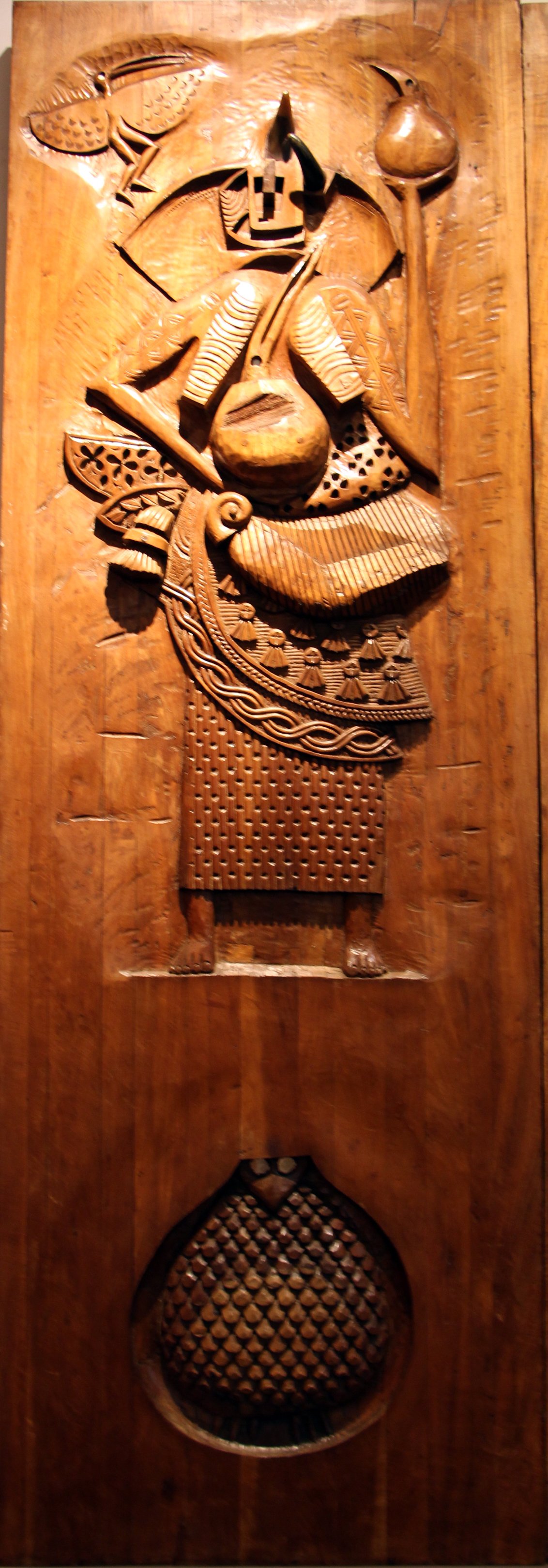 Candomblé nel Museu Afro-Brasileiro, Salvador